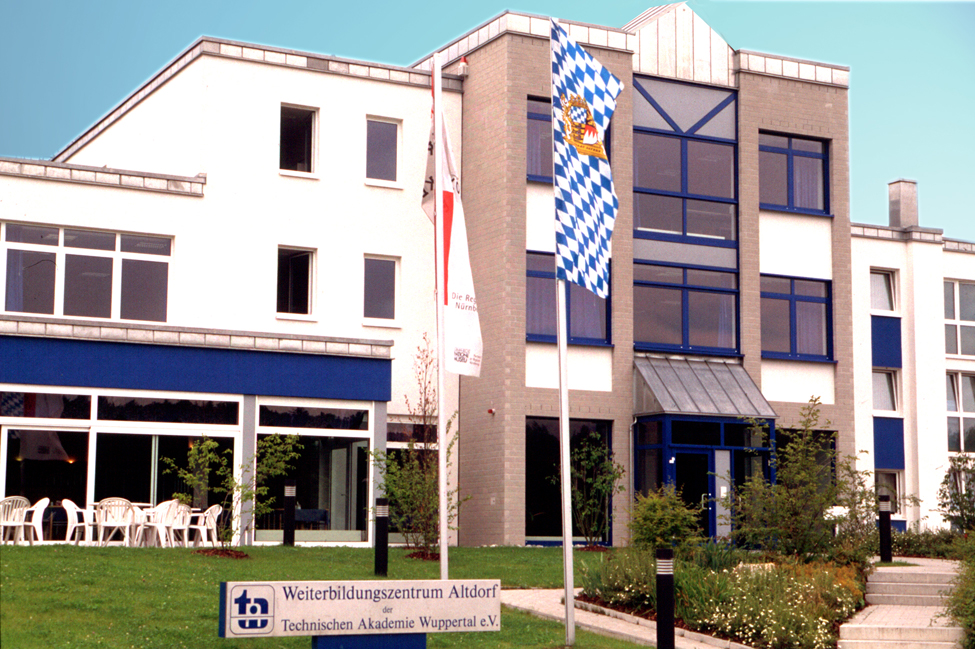 Taw Standort Altdorf